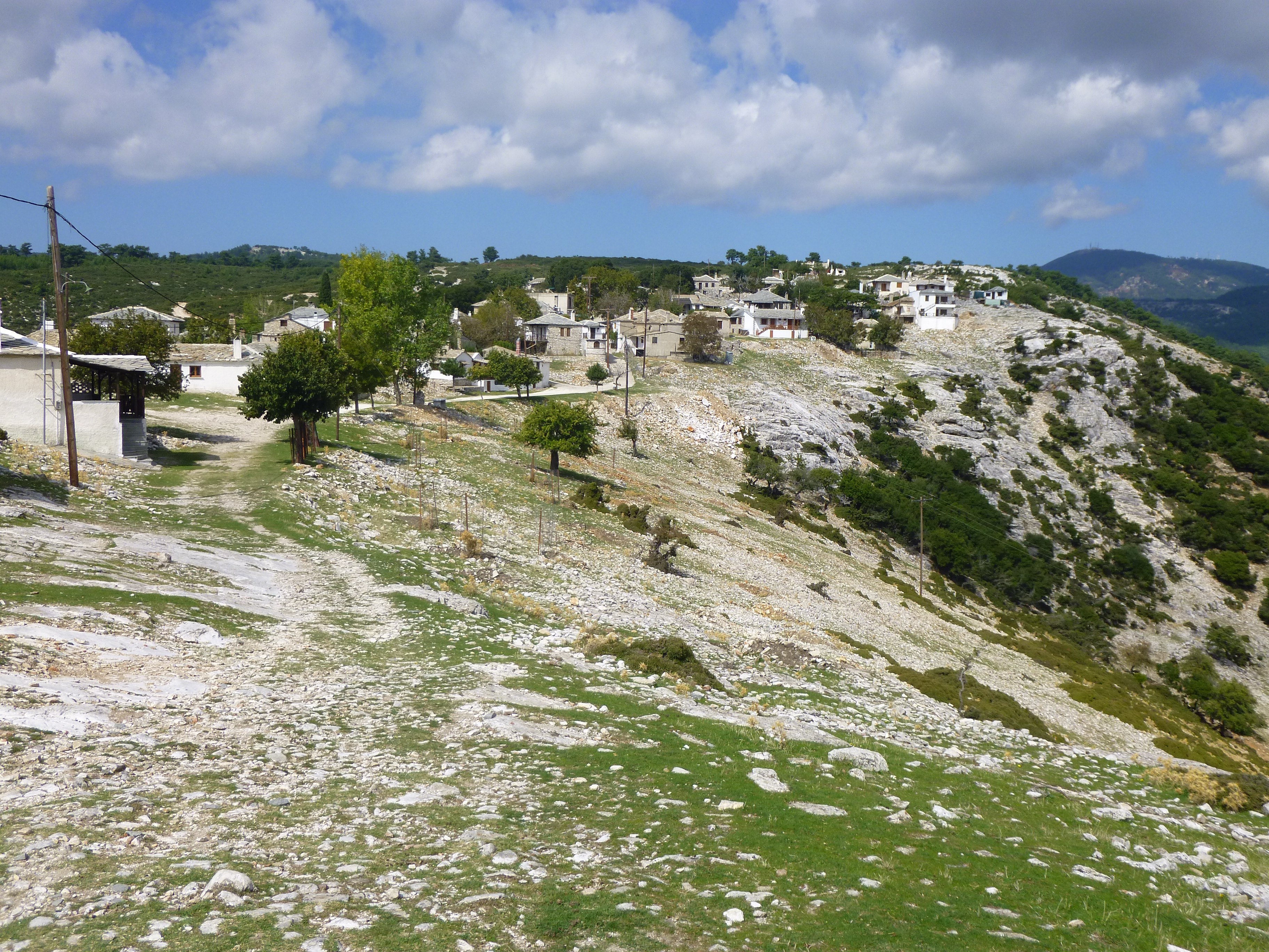 Blick auf das Bergdorf Kastro auf der griechischen Insel Thassos. Viele der alten Häuser sind zwischenzeitlich restauriert.